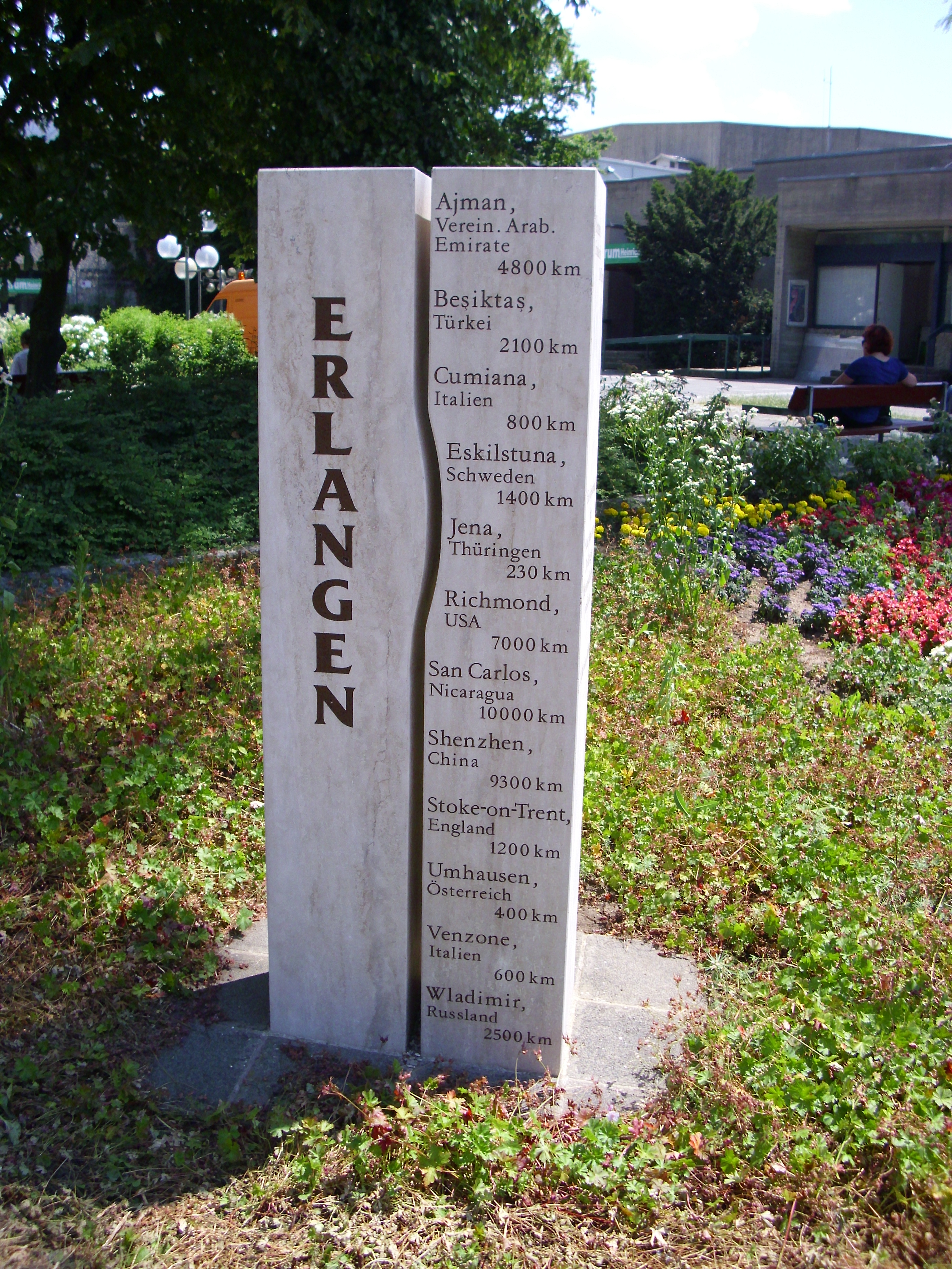 Skulpturen, Gedenksteine und Brunnen auf dem Erlanger Rathausplatz